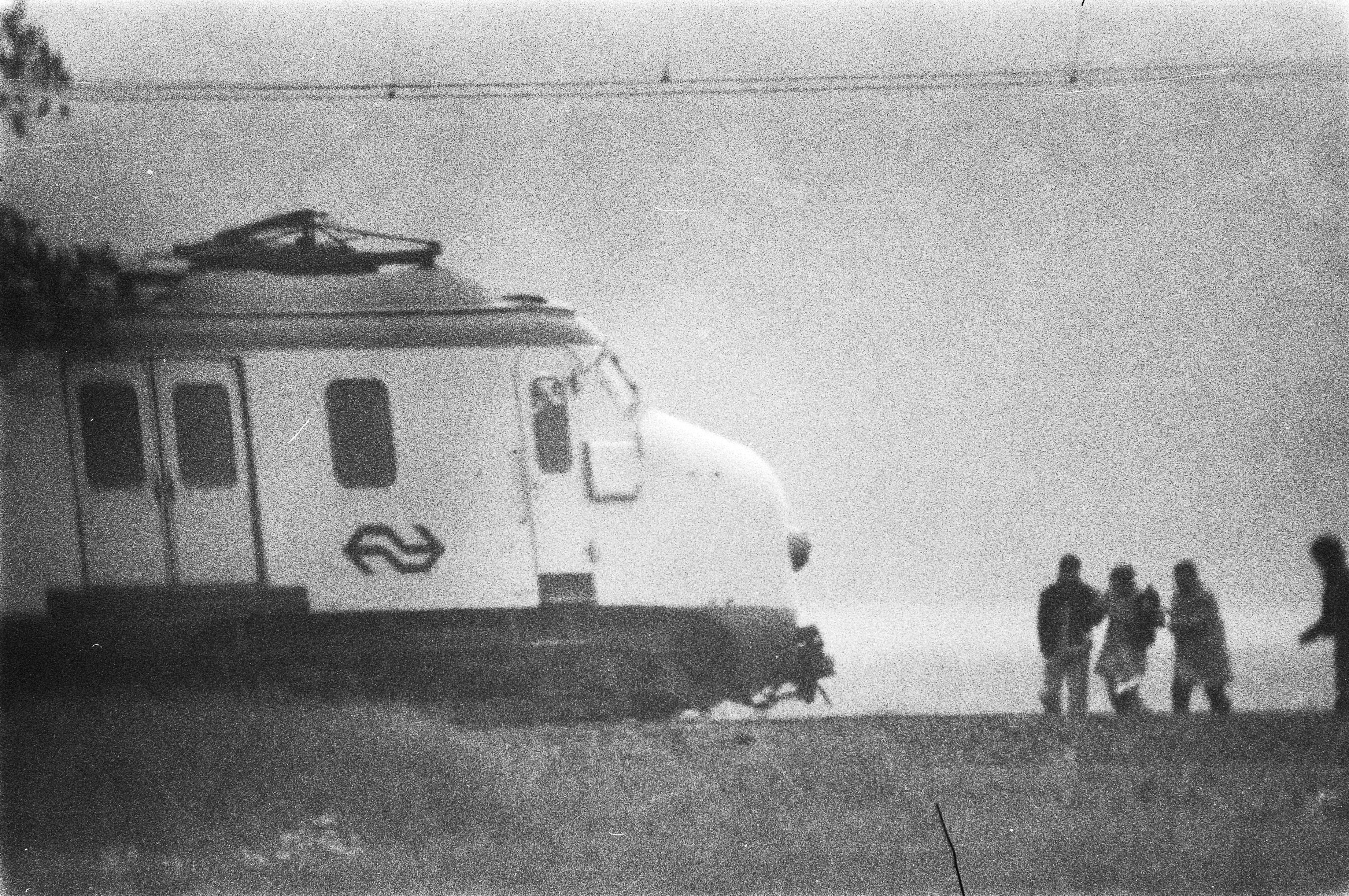 Collectie / Archief : Fotocollectie Anefo Reportage / Serie : [ onbekend ] Beschrijving : Gijzeling trein bij De Punt ; onderhandelaars mevrouw Soumoukil en dr. Tan vergezeld door kapers lopen naar trein (aankomst) Datum : 9 juni 1977 Trefwoorden : aankomsten, gijzelingen, treinen Persoonsnaam : Dr. Tan, Punt, De Fotograaf : Verhoeff, Bert / Anefo Auteursrechthebbende : Nationaal Archief Materiaalsoort : Negatief (zwart/wit) Nummer archiefinventaris : bekijk toegang 2.24.01.05 Bestanddeelnummer : 929-2200